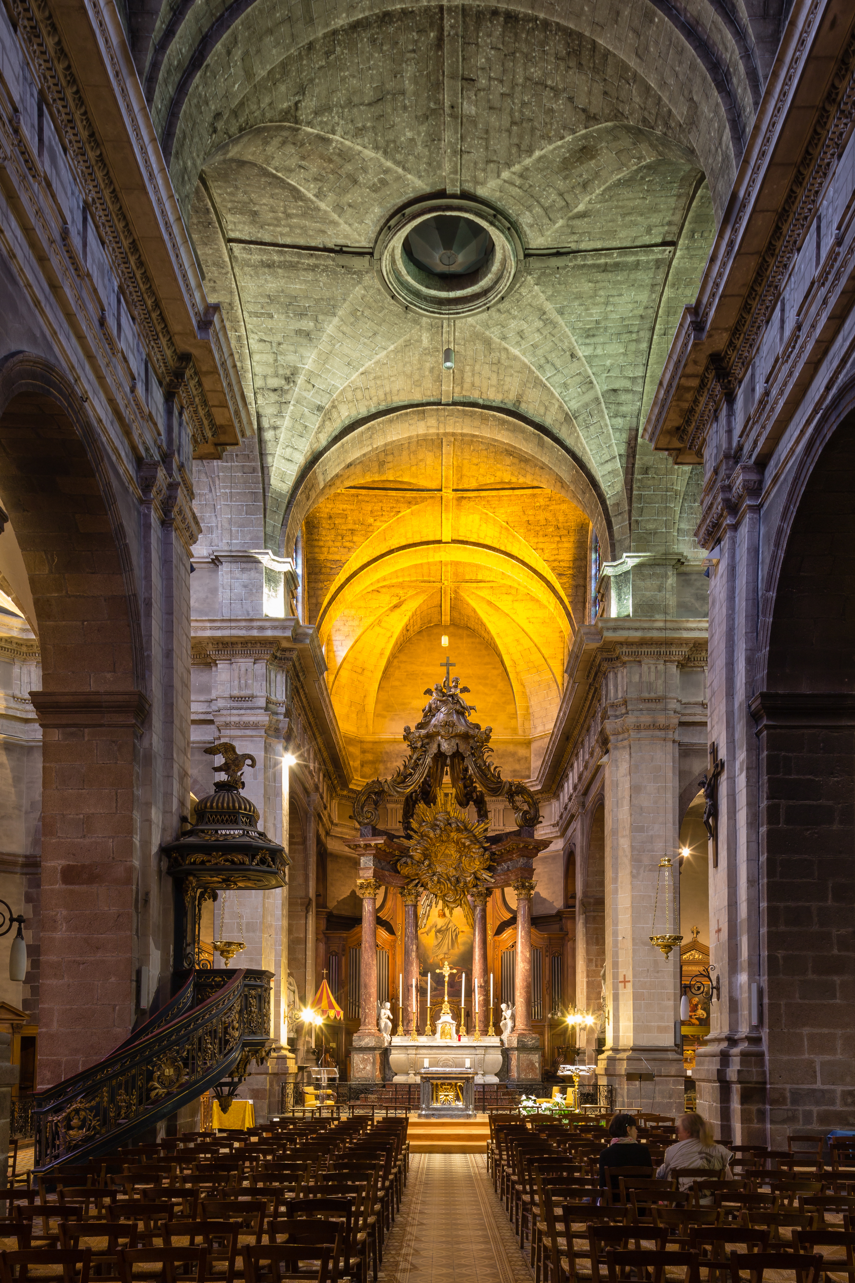 Vaisseau central de la basilique Saint-Sauveur de Rennes (France).